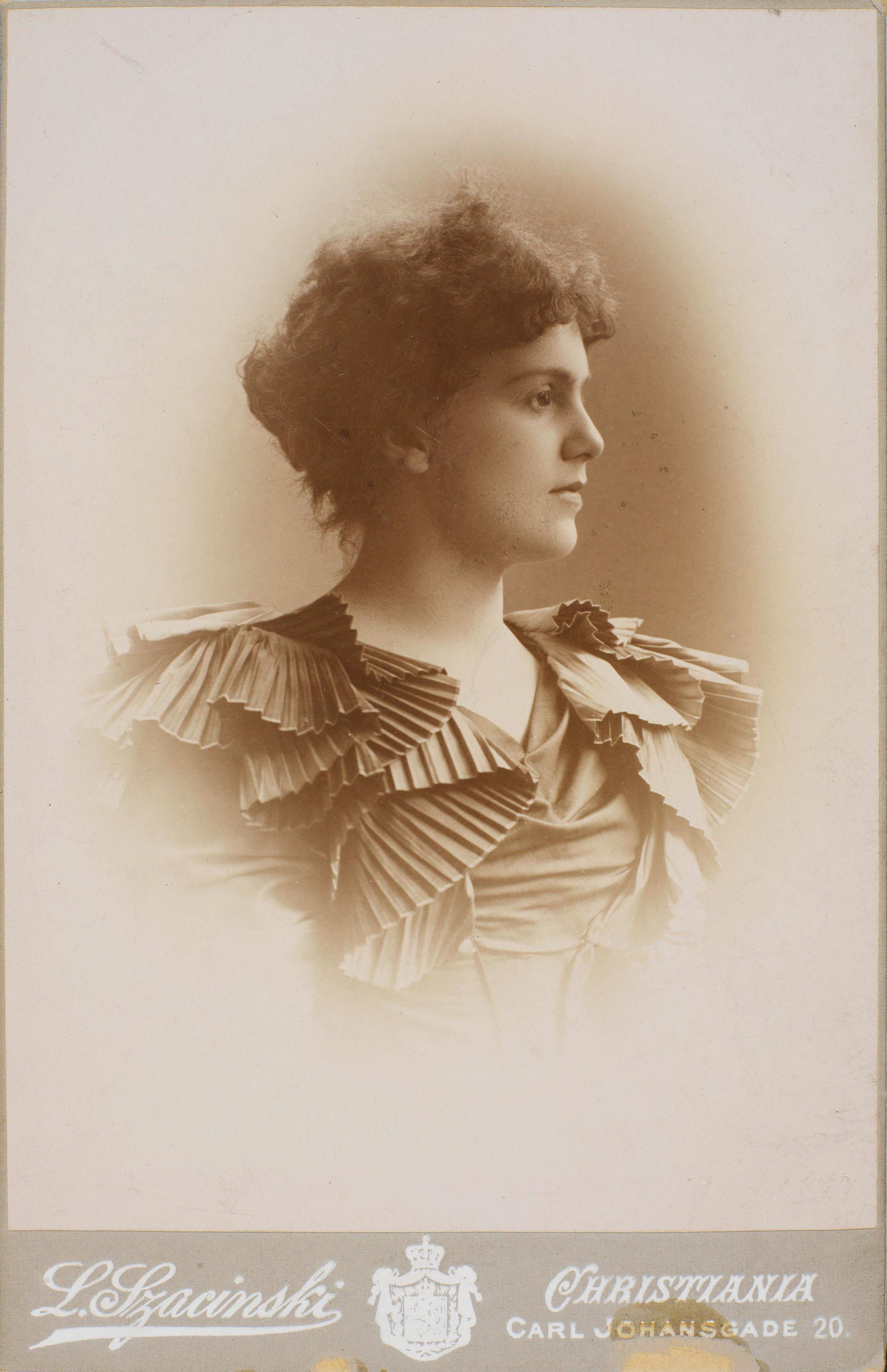 Bildet er hentet fra Nasjonalbibliotekets bildesamling Depicted person: Ibsen, Bergliot